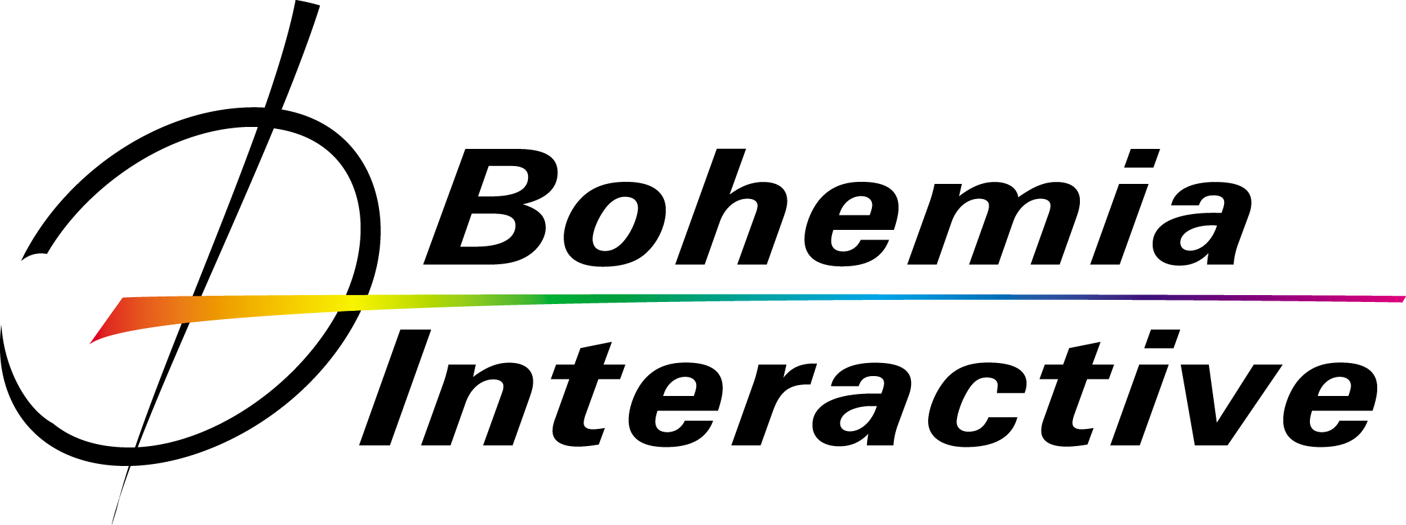 Logo